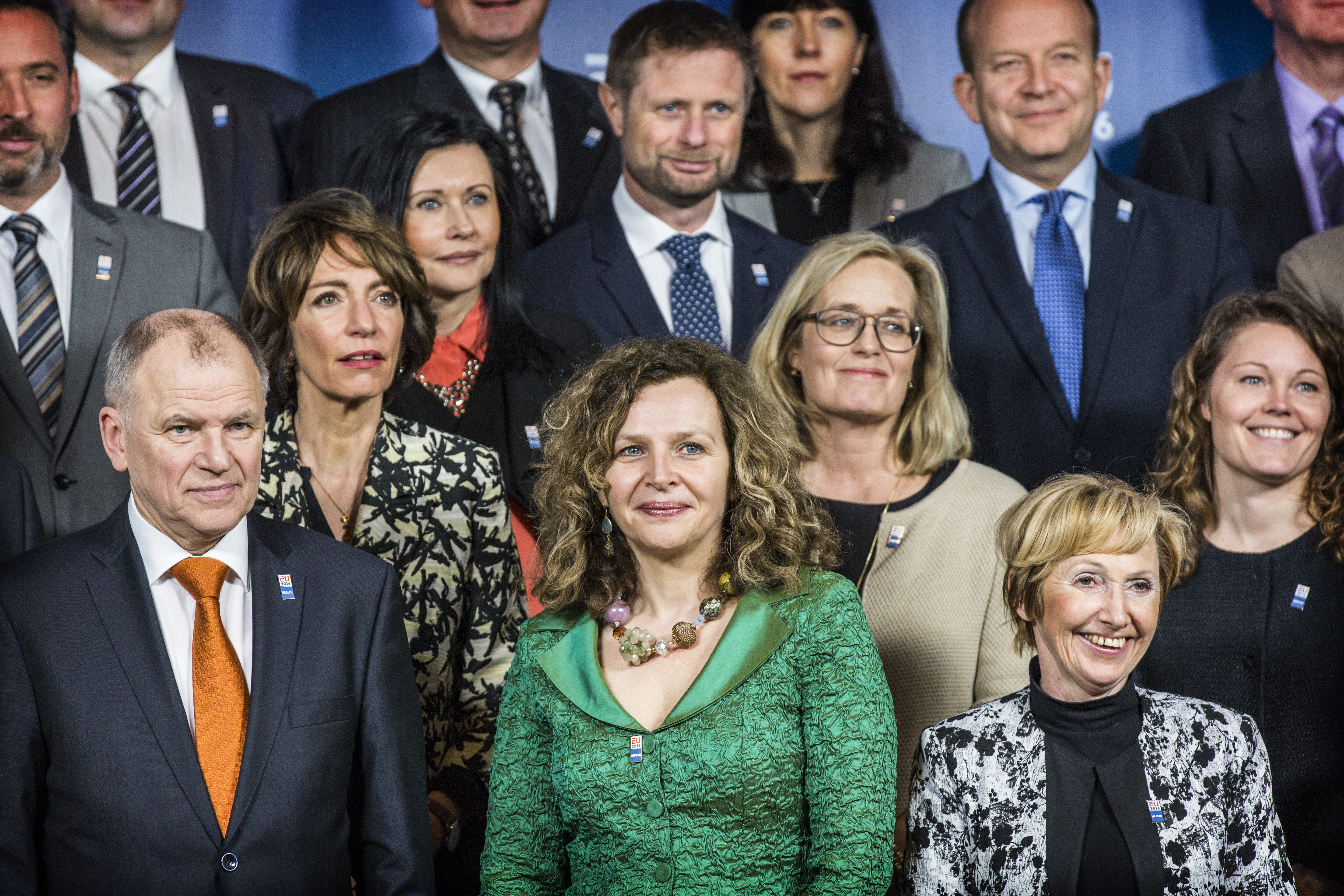 Amsterdam, 18 april 2016 / Amsterdam, April 18th 2016. Raad Werkgelegenheid, Sociaal Beleid, Gezondheid en Consumentenzaken (Gezondheid) met minister van VWS Edith Schippers. Informal Meeting of Ministers of Health with Dutch minister Edith Schippers. Foto: Rijksoverheid/Valerie Kuypers – Photograph: Dutch Government/Valerie Kuypers